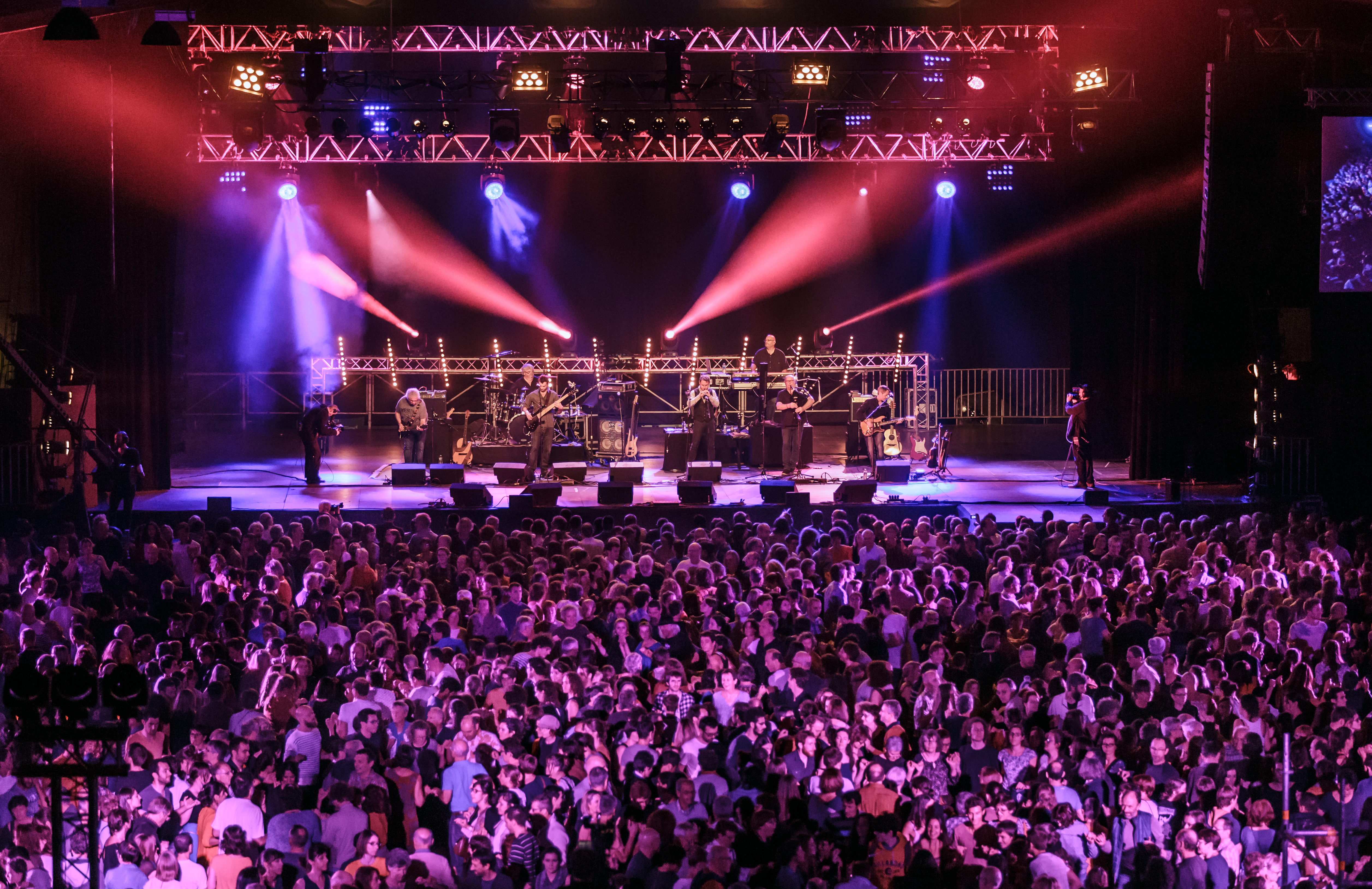 Sonerien Du en fest-noz lors du festival Yaouank le 19 novembre 2016 au MusikHall du Parc Expo de Rennes.